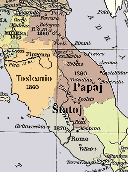 Esperantigita versio de Dosiero:Papal States Map 1870.png Prilaborita de Punktor 20:11, 3. Aŭg 2008 (UTC)